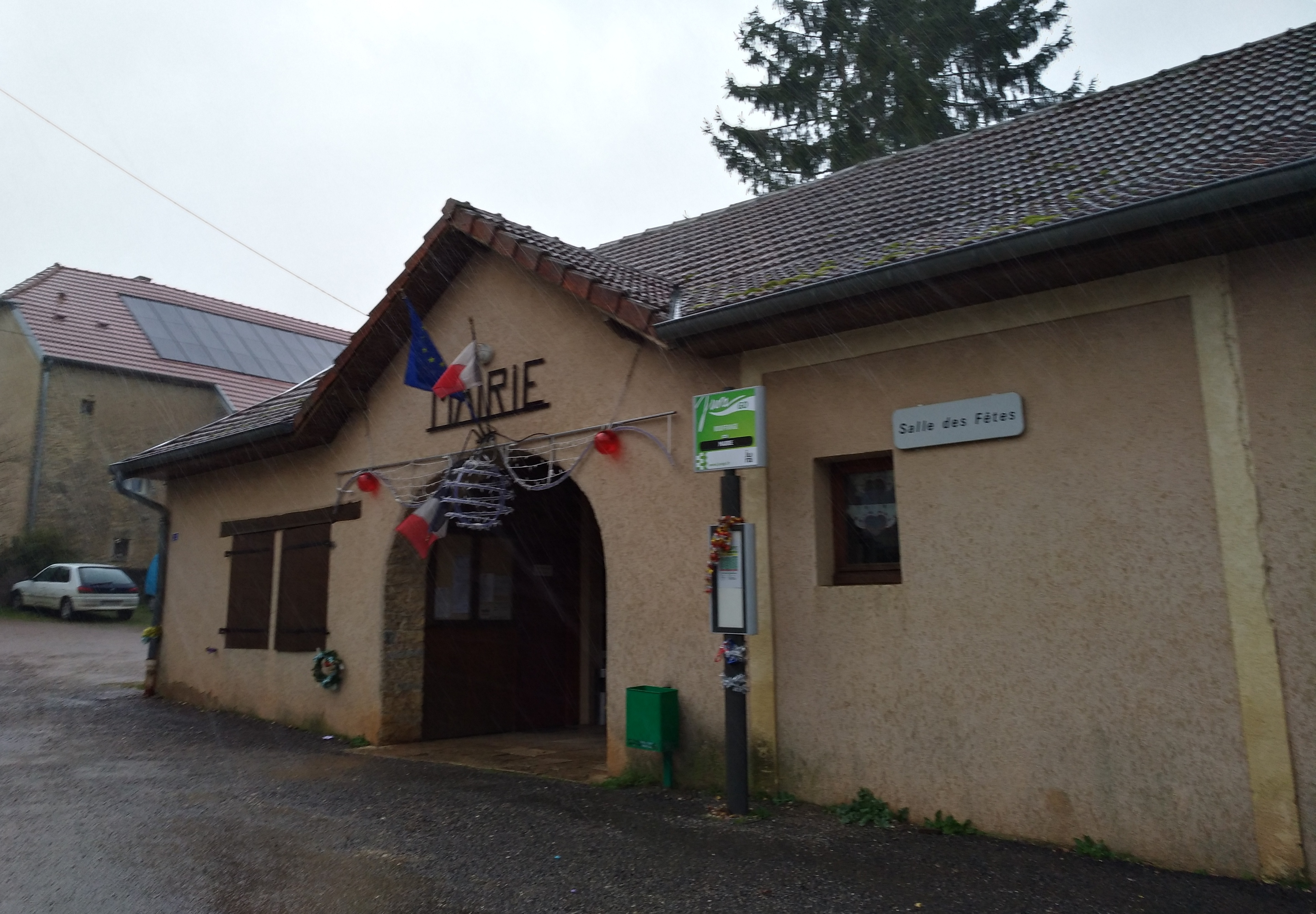 Mairie de Rouffange (Jura, France), sous une intense pluie, en janvier 2018.